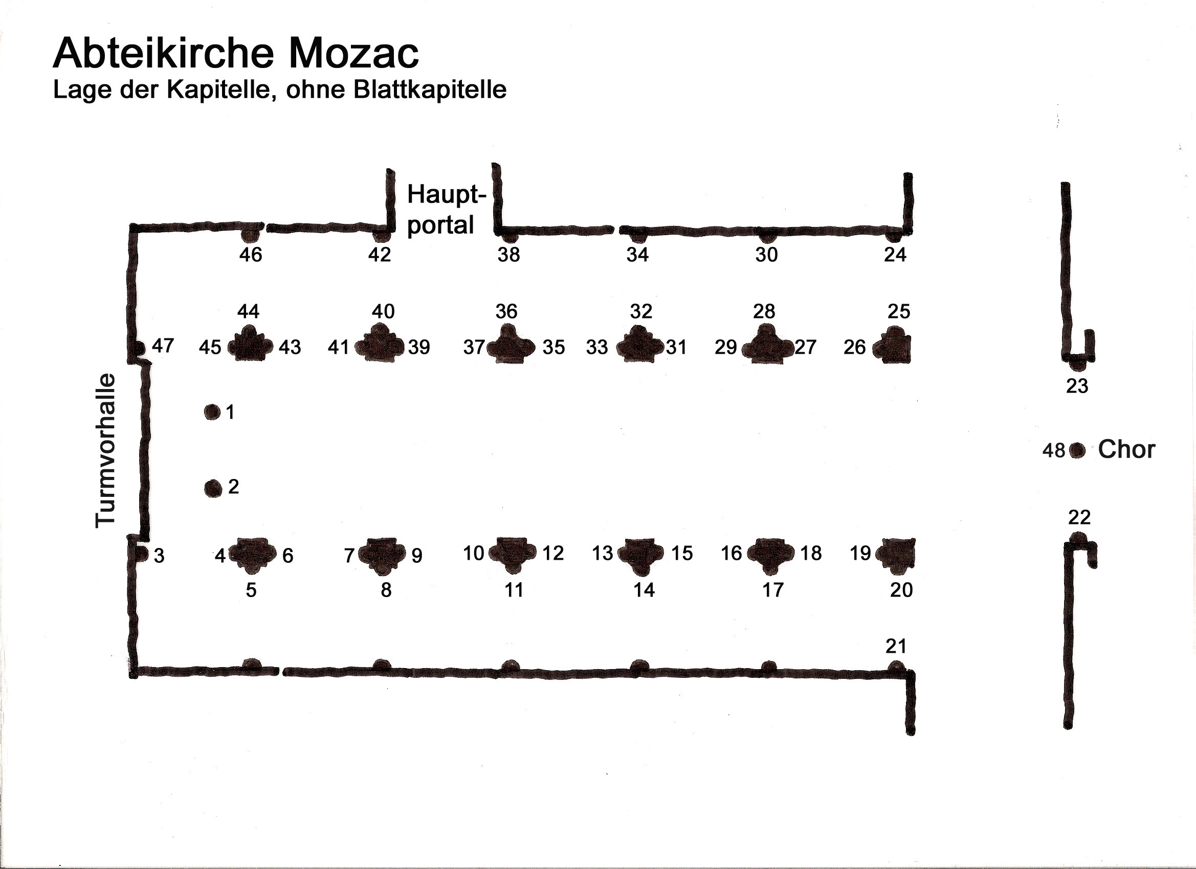 Mozac, Lage der Kapitelle